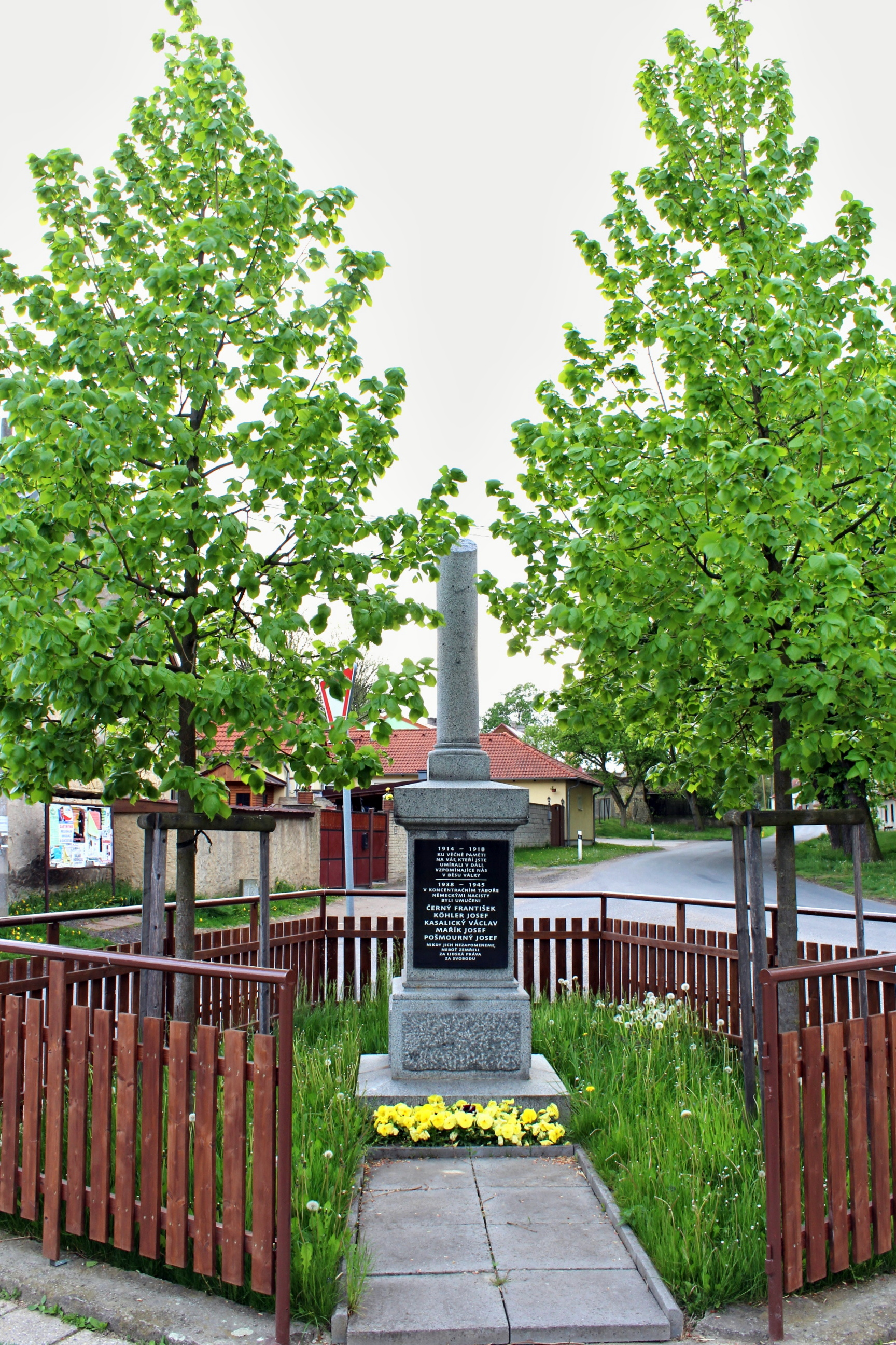 Třtice náves